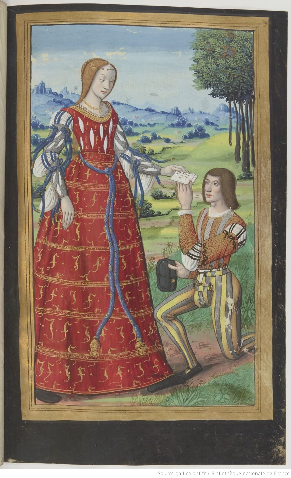 Phaedra. Héroïdes d'Ovide - Jean Pichore - BNF Fr874